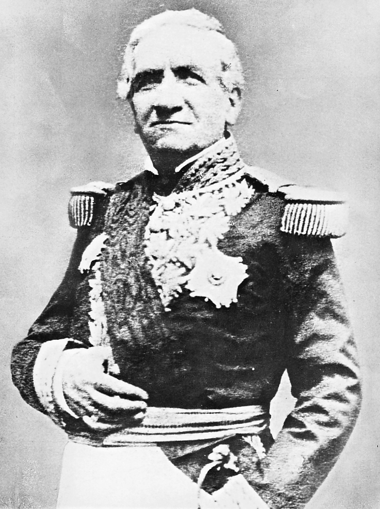 Mariscal Andrés de Santa Cruz, hacia 1860. Reproducción de una fotografía del Archivo Courret - BNP